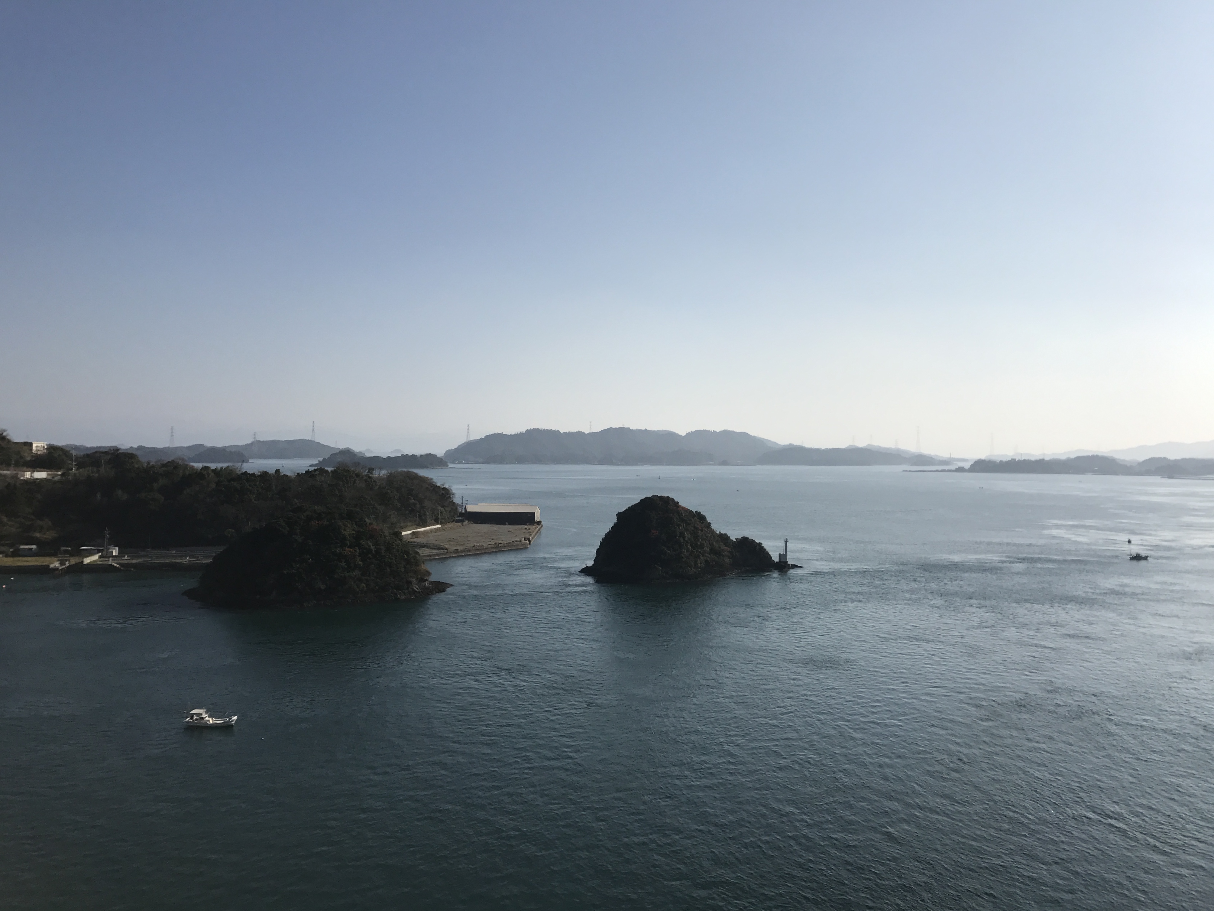 天門橋より望む戸馳島(左)、維和島と大矢野島(右)。手前は宇土半島と荷島